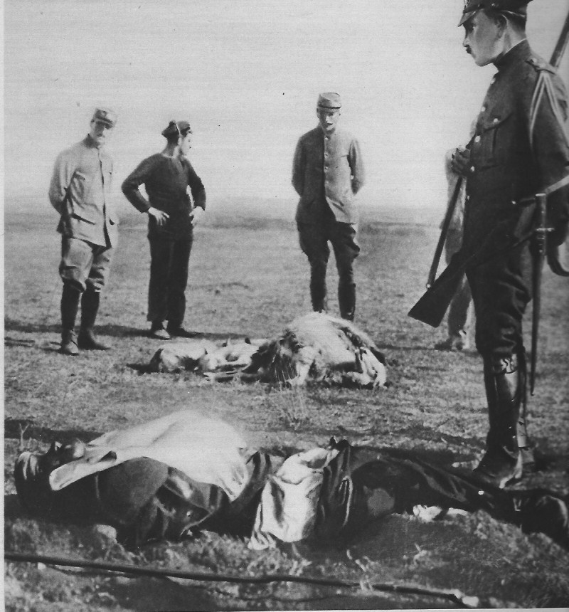 Le Miroir titre le 16 janvier 1916 "première attaque de Zepplin", en fait l'image prise montre le 30 décembre un Aviatik lache une bombe sur des troupes en manoeuvre : des grecs avec le général Zimbrakakis, résultat un patre mort et des montons aussi.